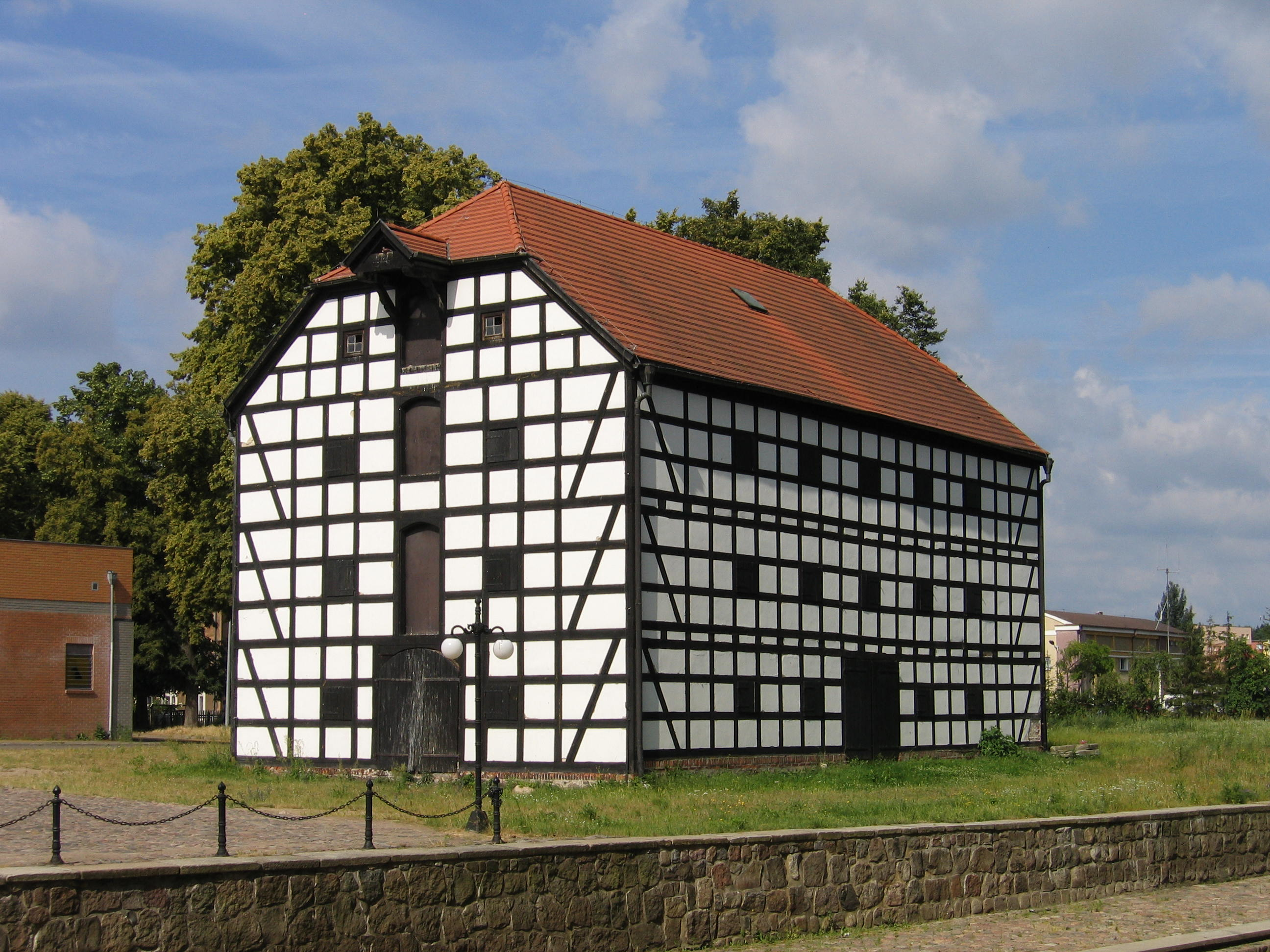 Goleniów, ul. Nadrzeczna 8 - spichlerz